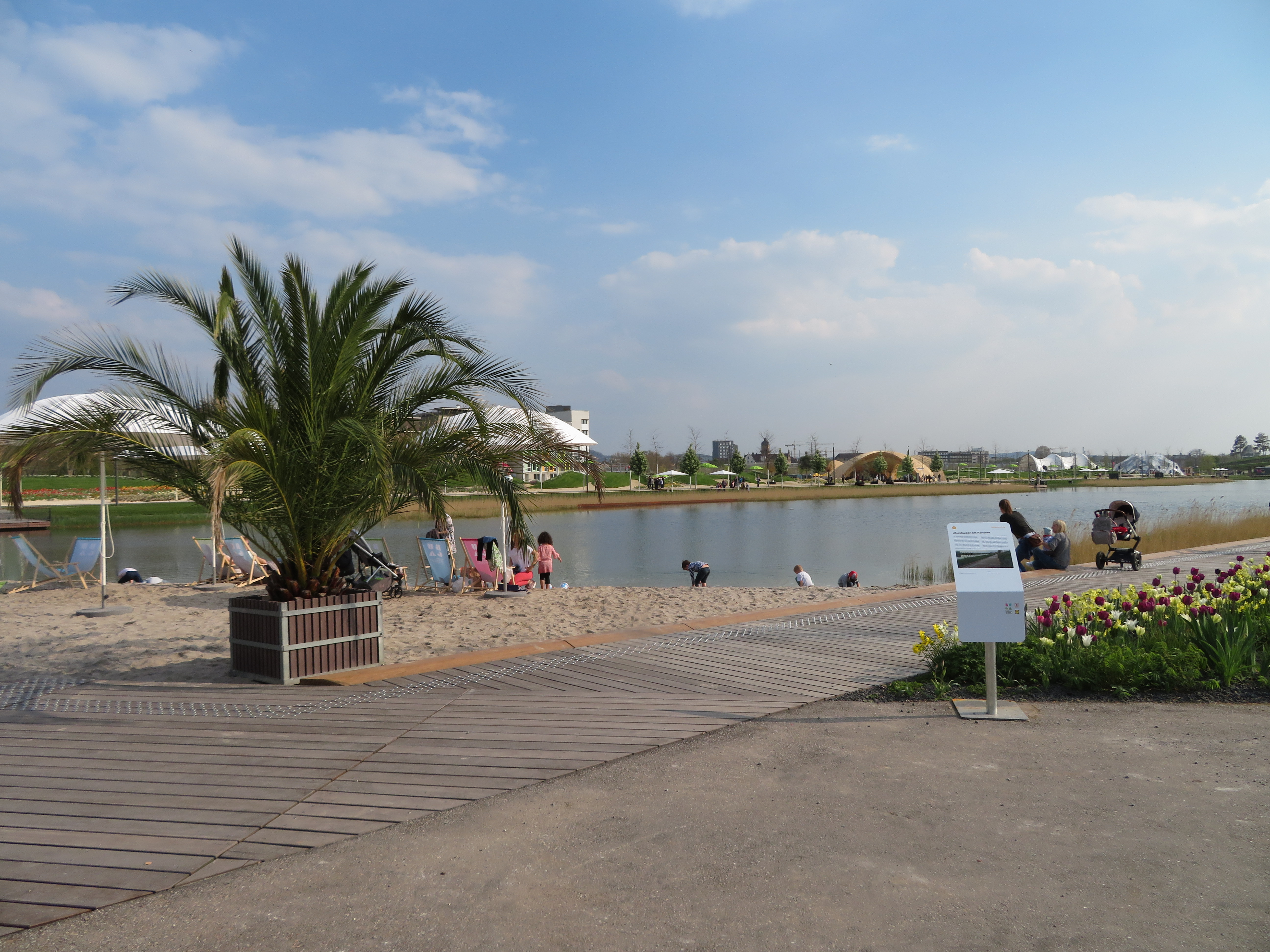 auf der Bundesgartenschau 2019 in Heilbronn